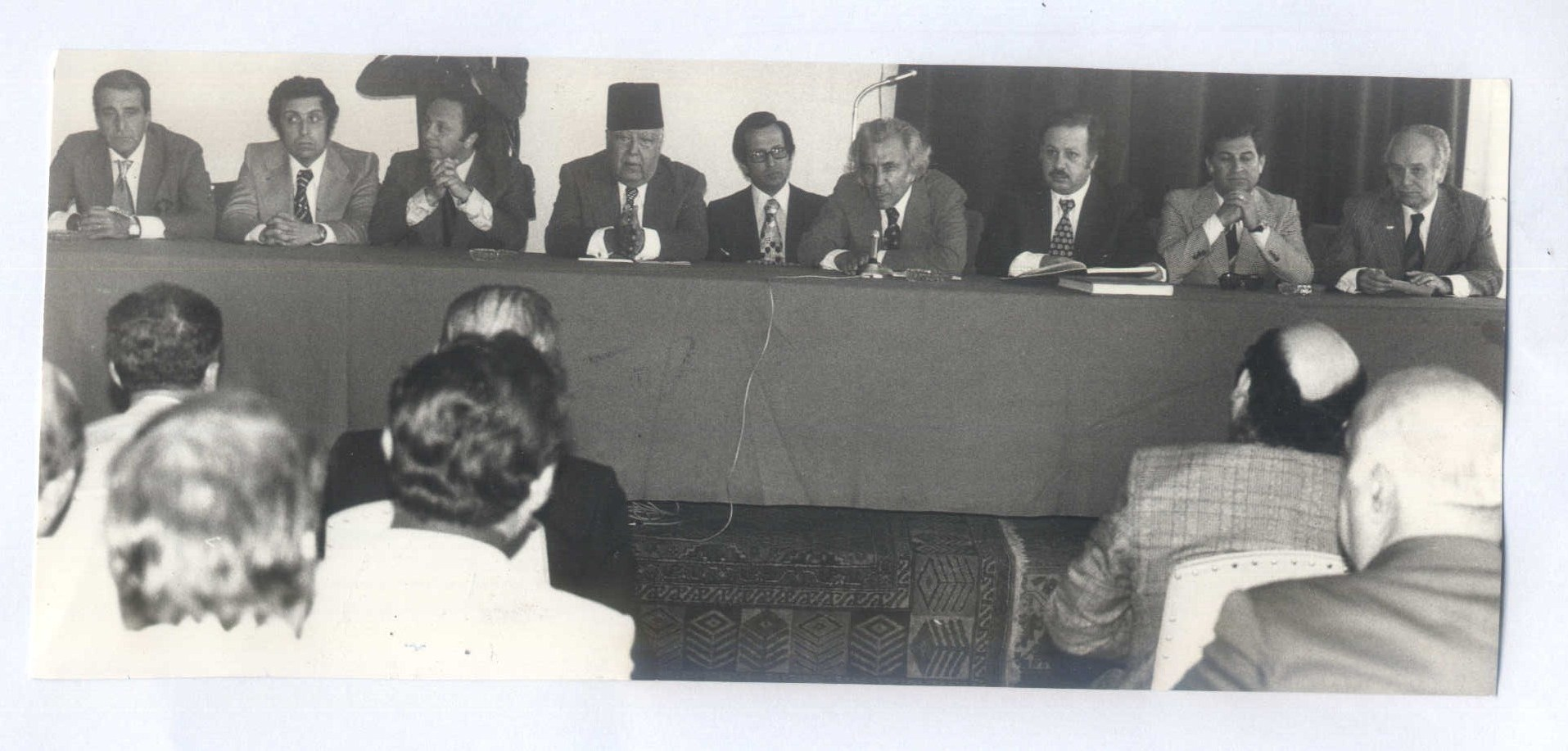 Conferance de presse de l'Association des Industriels